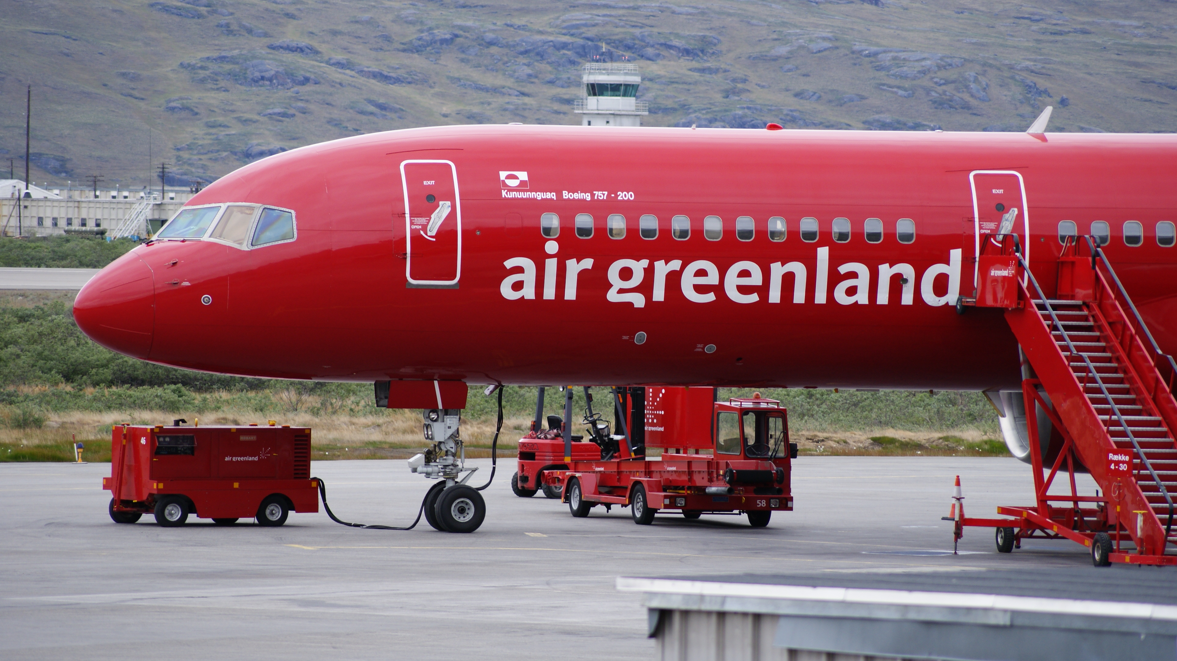 Air Greenland Boeing 757-200 "Kunuunnguaq" at Kangerlussuaq Airport, Greenland.